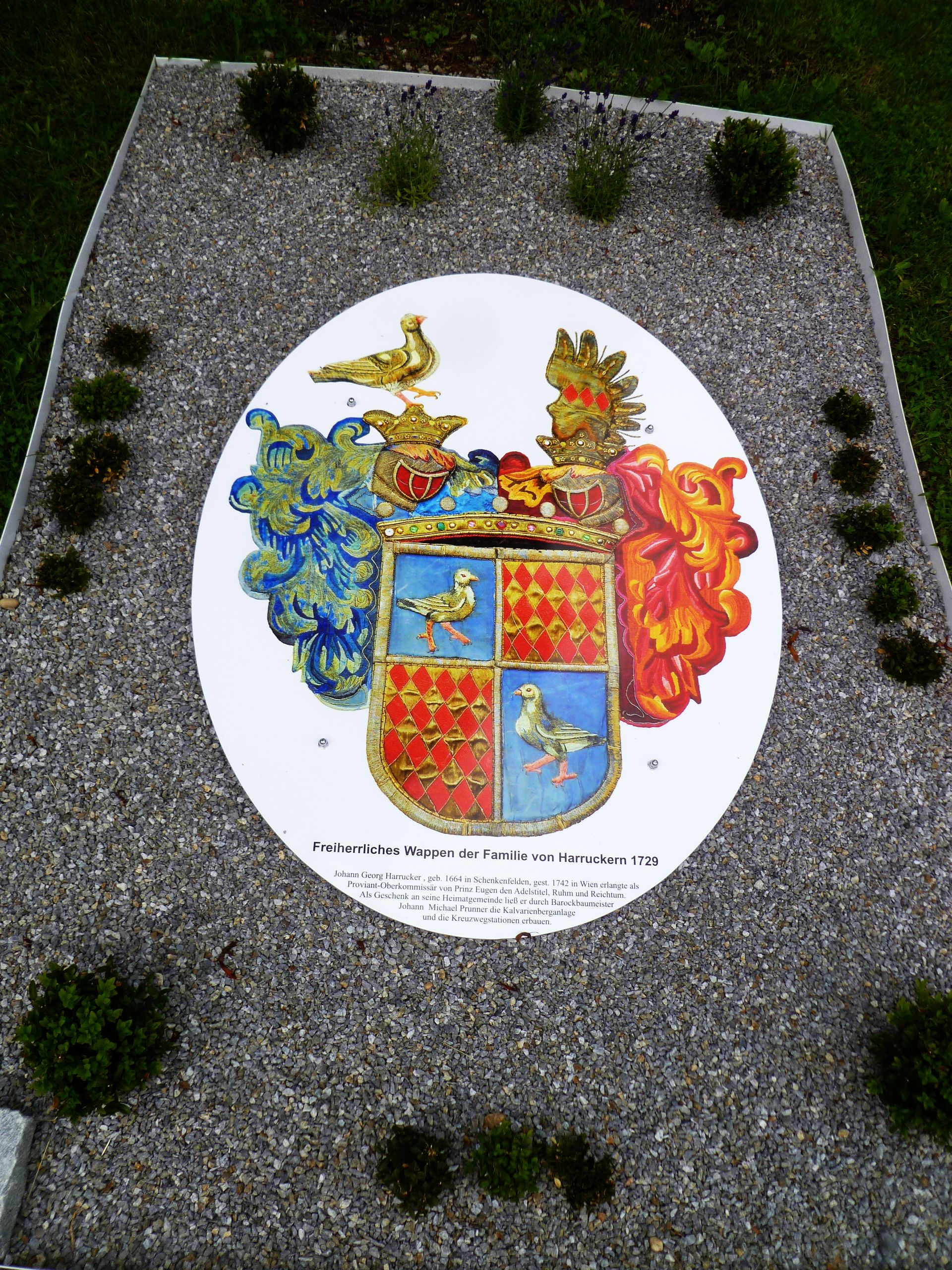 Wappen der Haruckern